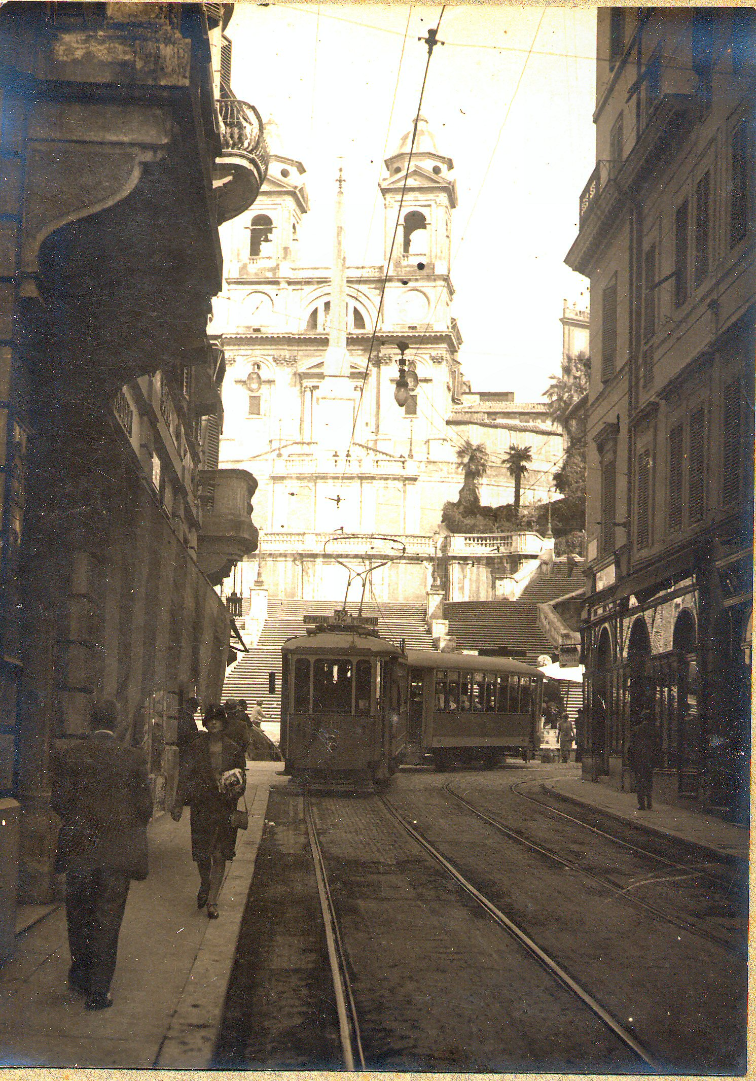 via dei condotti